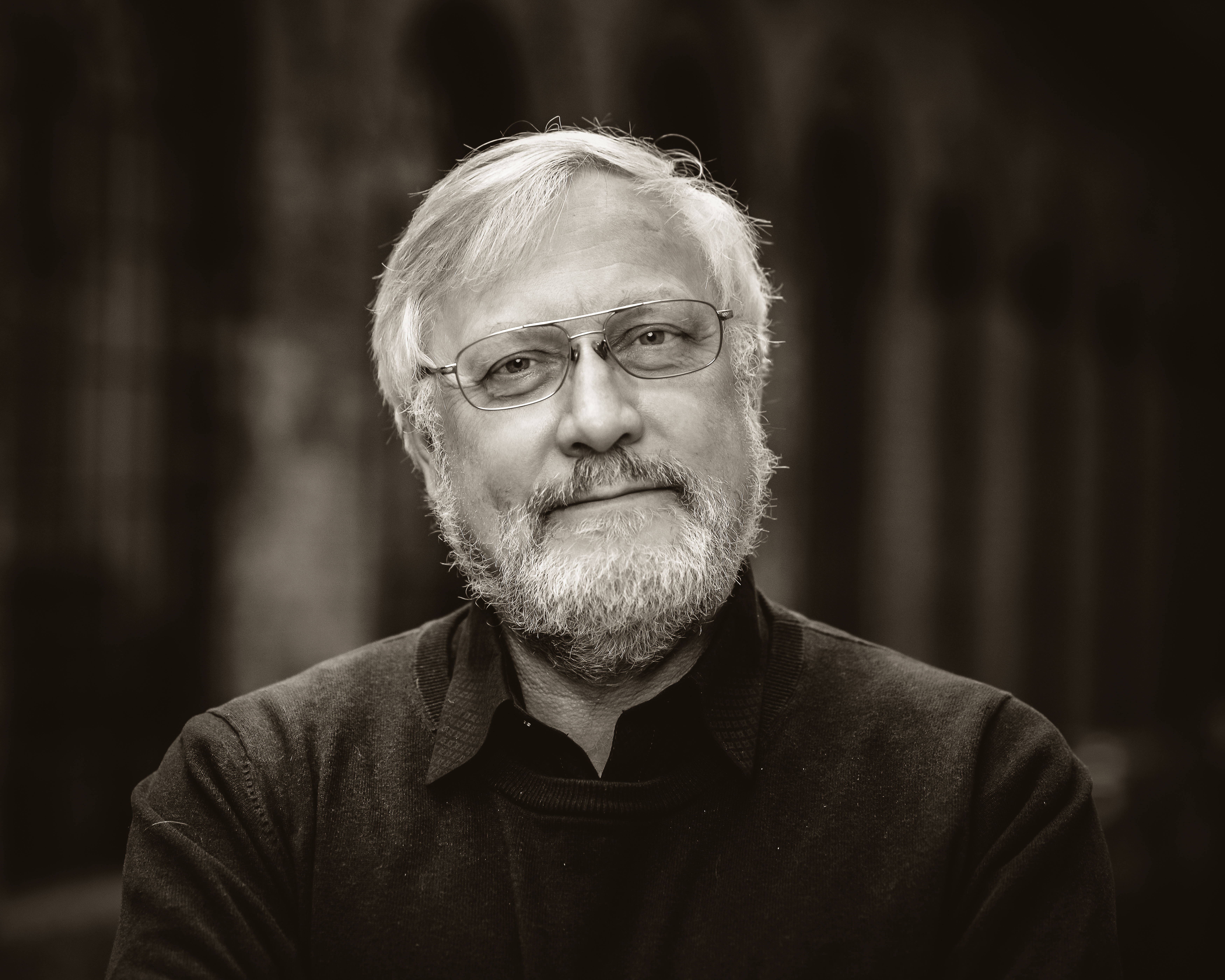 Førsteamanuensis Lars Gule ved Fakultet for lærerutdanning og internasjonale studier ved OsloMet – storbyuniversitetet.